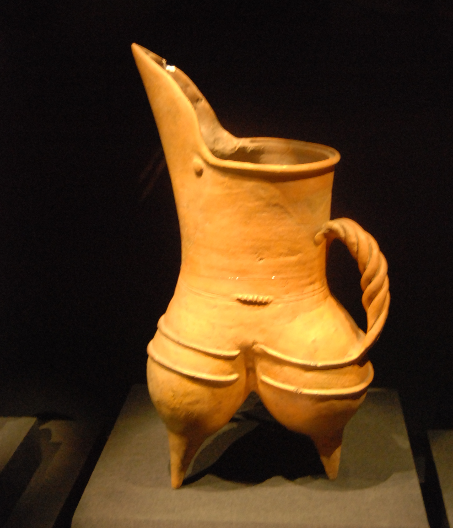 中文（中国大陆）: 鬲，摄于故宫